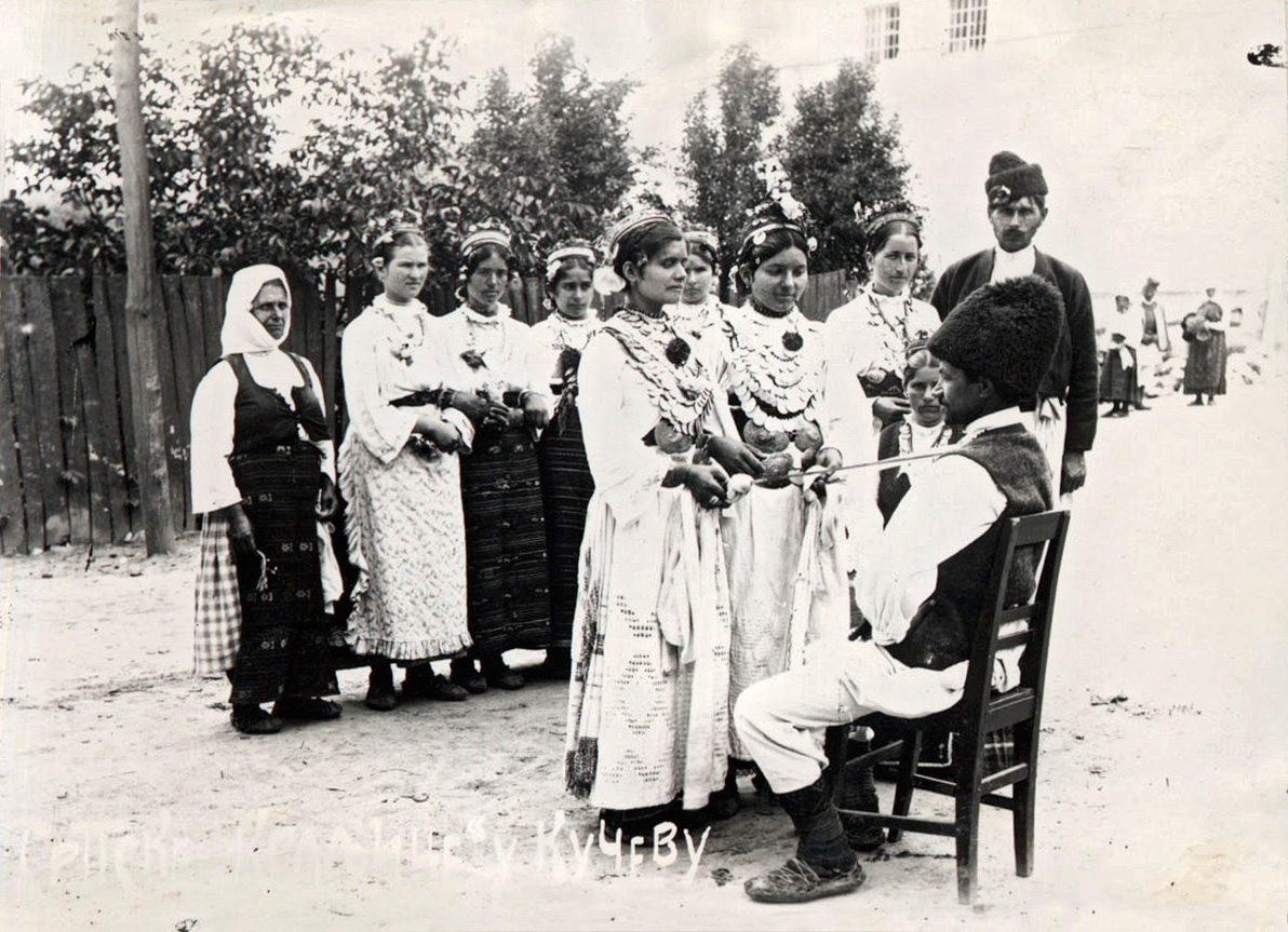 Обряд «Кралице» в Сербии